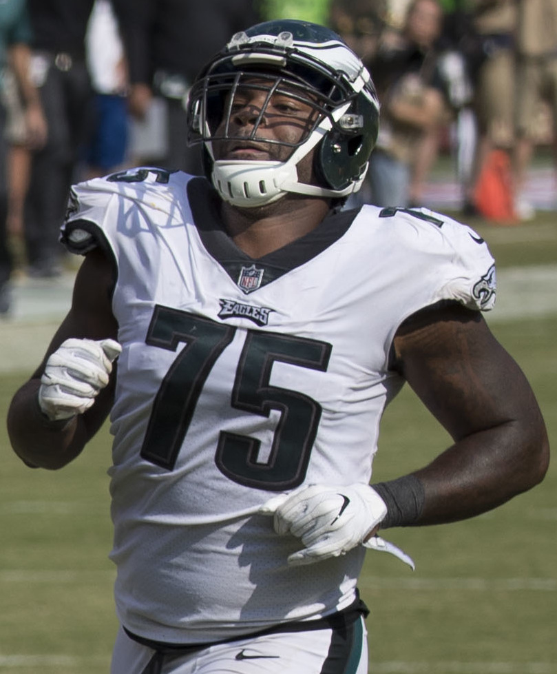 Eagles at Redskins 9/10/17